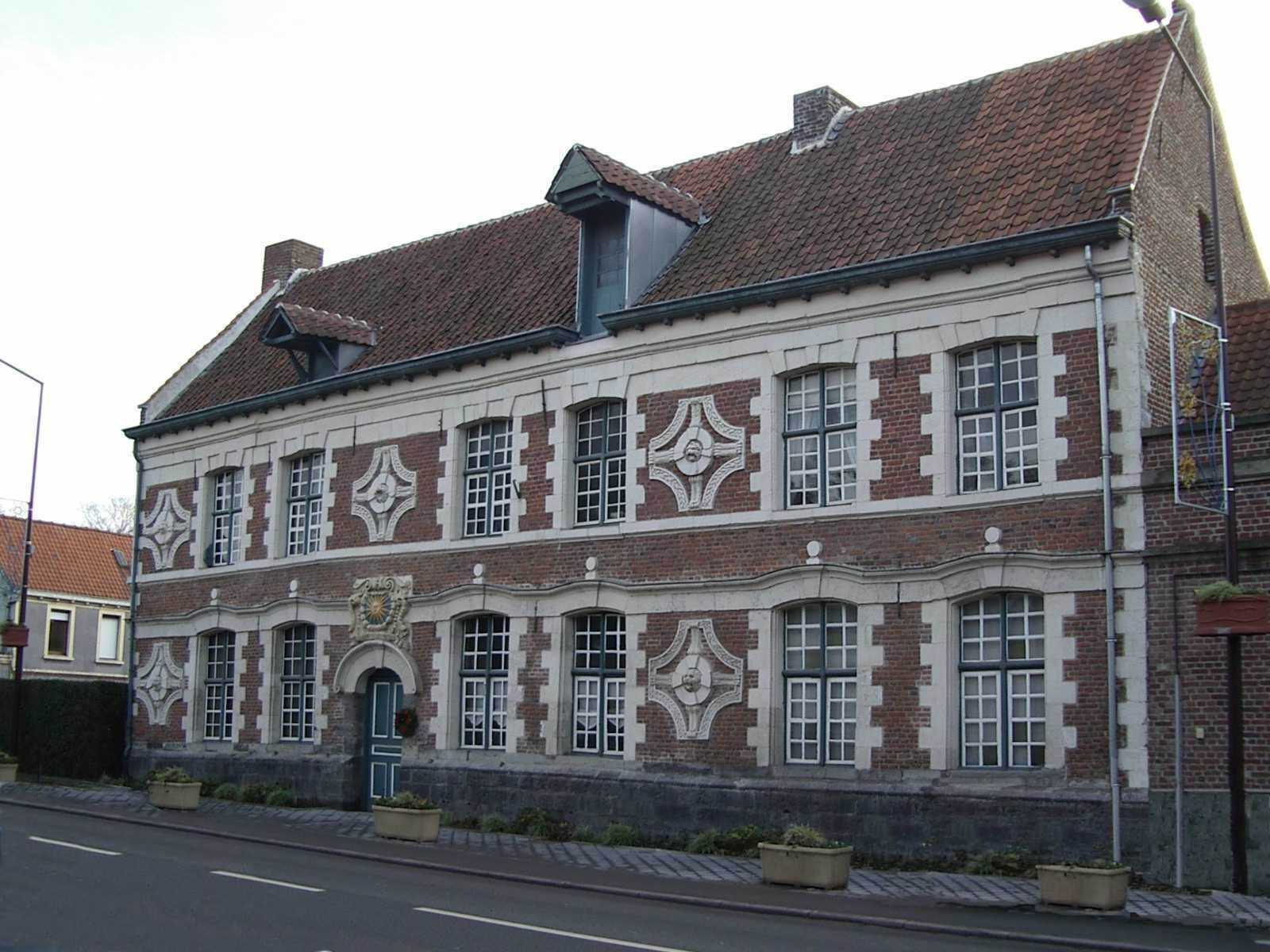 Ancien relais de Poste Royale (la Hamaide)à Chereng